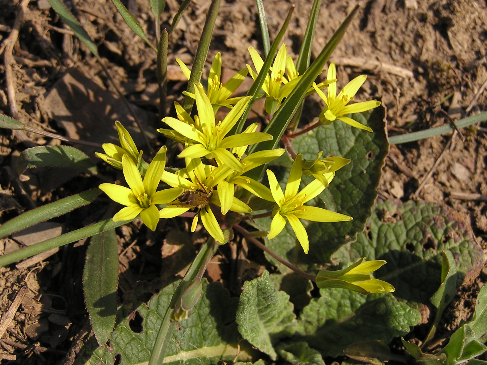 Растение в Донецке.